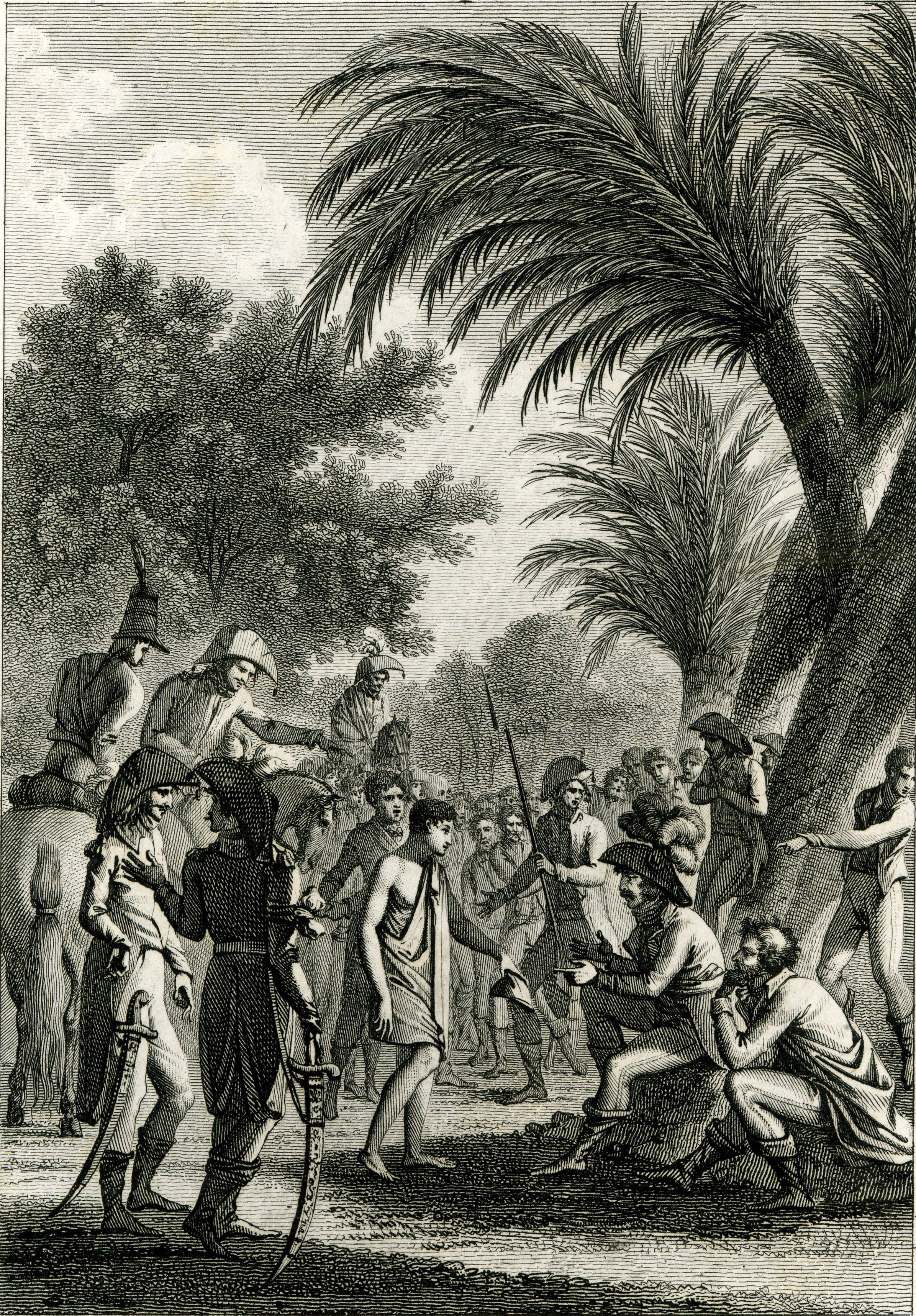 La gravure « La clémence de Desaix » de Vivant Denon représente Desaix rendant la justice sous un palmier en Égypte. Elle est parue dans « Voyage dans la basse et la haute Égypte » en 1802. Desaix demande à un jeune voleur de fusils de livrer les personnes qui l'on incité à agir et, menace de le punir, s’il se tait. L’enfant répond uniquement, mettant son bonnet aux pieds du général, « Dieu seul m’a inspiré. Voilà ma tête, faites-la couper ». « Pauvre petit malheureux, qu’on le renvoie ! » répond Desaix. Citation de Vivant Denon.